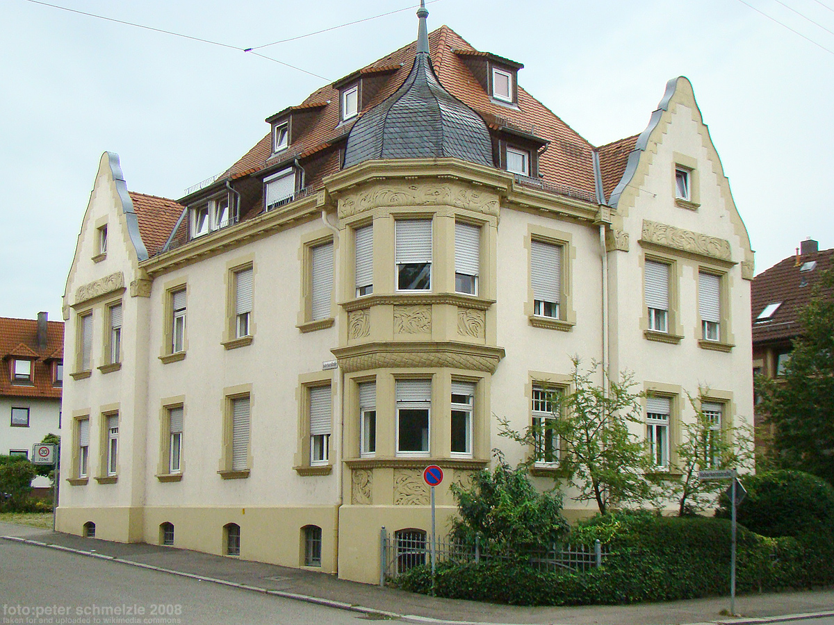 Denkmalgeschütztes Gebäude Kolpingstr. 18 in Heilbronn-Sontheim